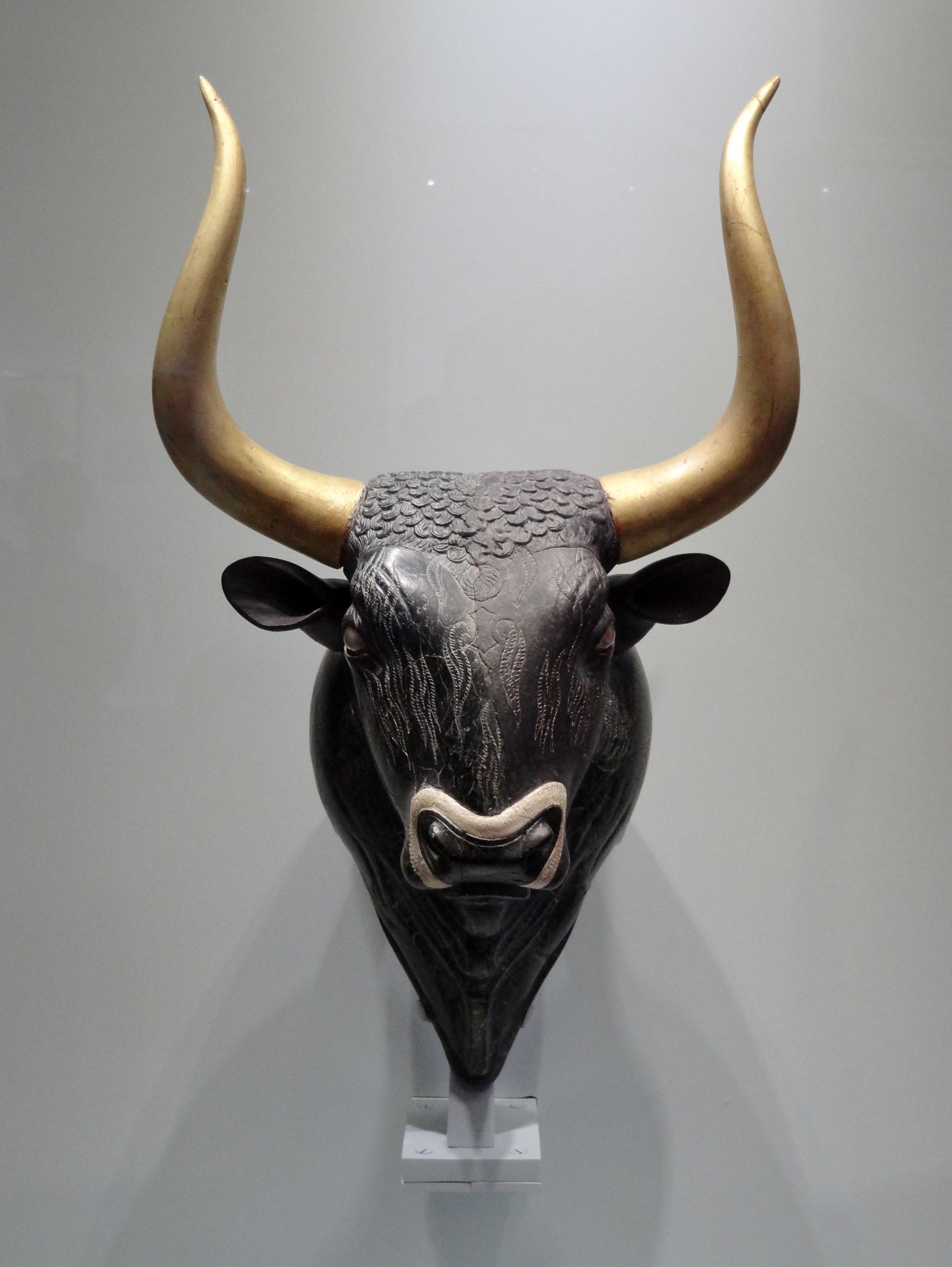 Stierkopf-Rhyton aus schwarzem Serpentin aus dem kleinen Palast von Knossos (1600–1450 v. Chr.), ausgestellt im Archäologischen Museum Iraklio, Kreta, Griechenland